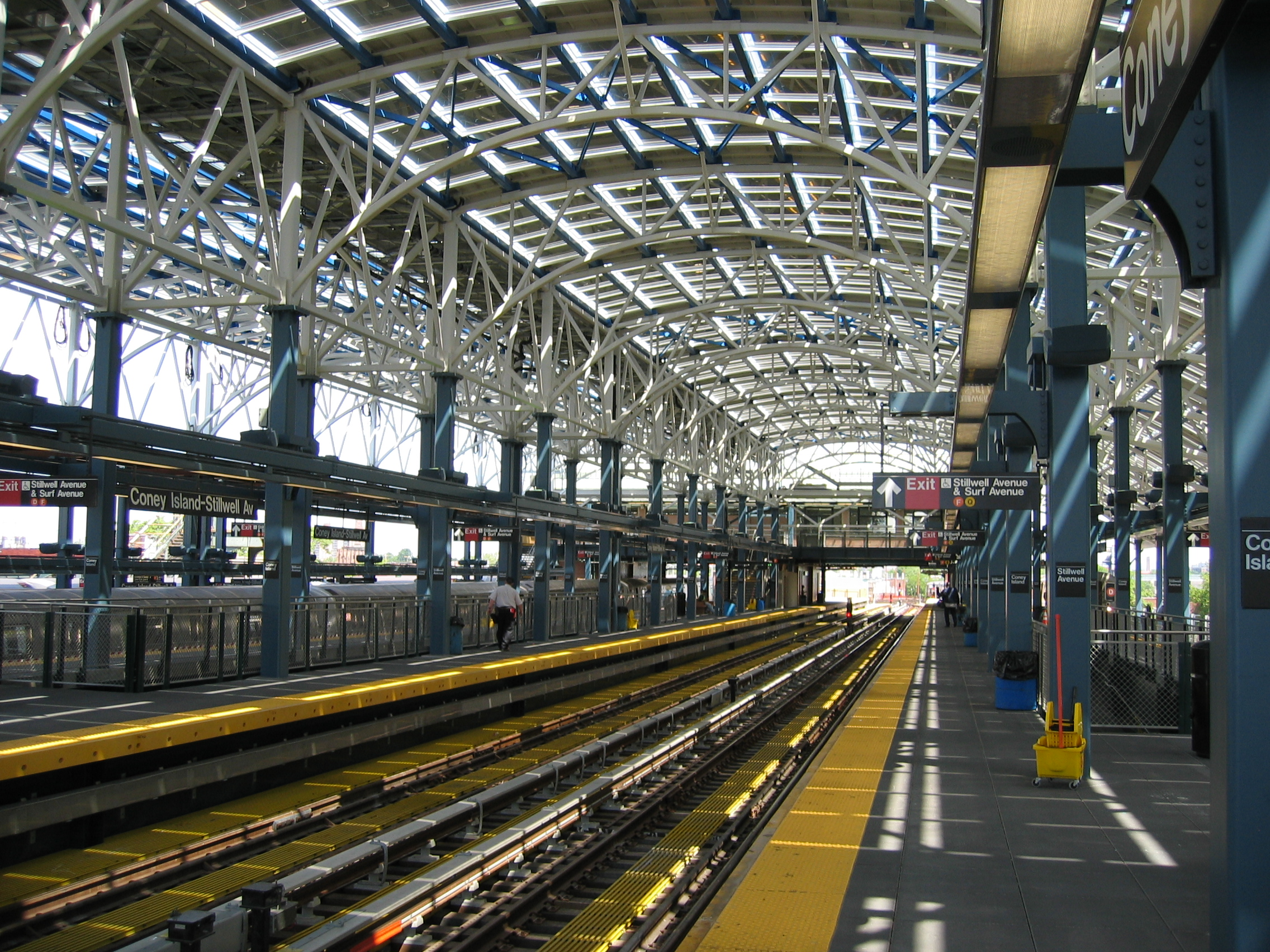 Für das weltweit größte Photovoltaik-Projekt: Die Solarglasflächen der Glaswerke Arnold werden auf dem Dach der Bahn-Station „Stillwell Avenue“ in New York (Coney Island) montiert.